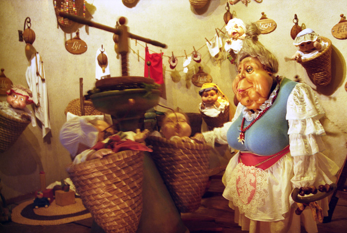 Efteling, Volk van Laaf